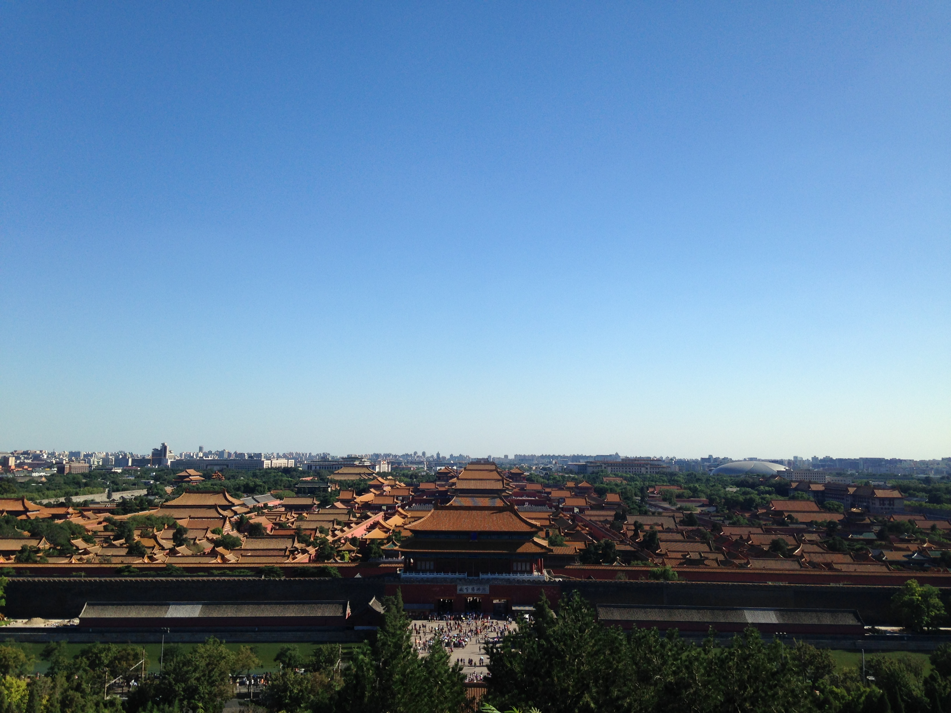 景山公園の万春亭より望む紫禁城